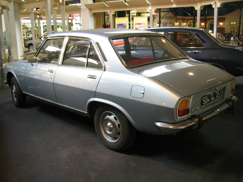 Peugeot 504 - Musée Peugeot de Sochaux